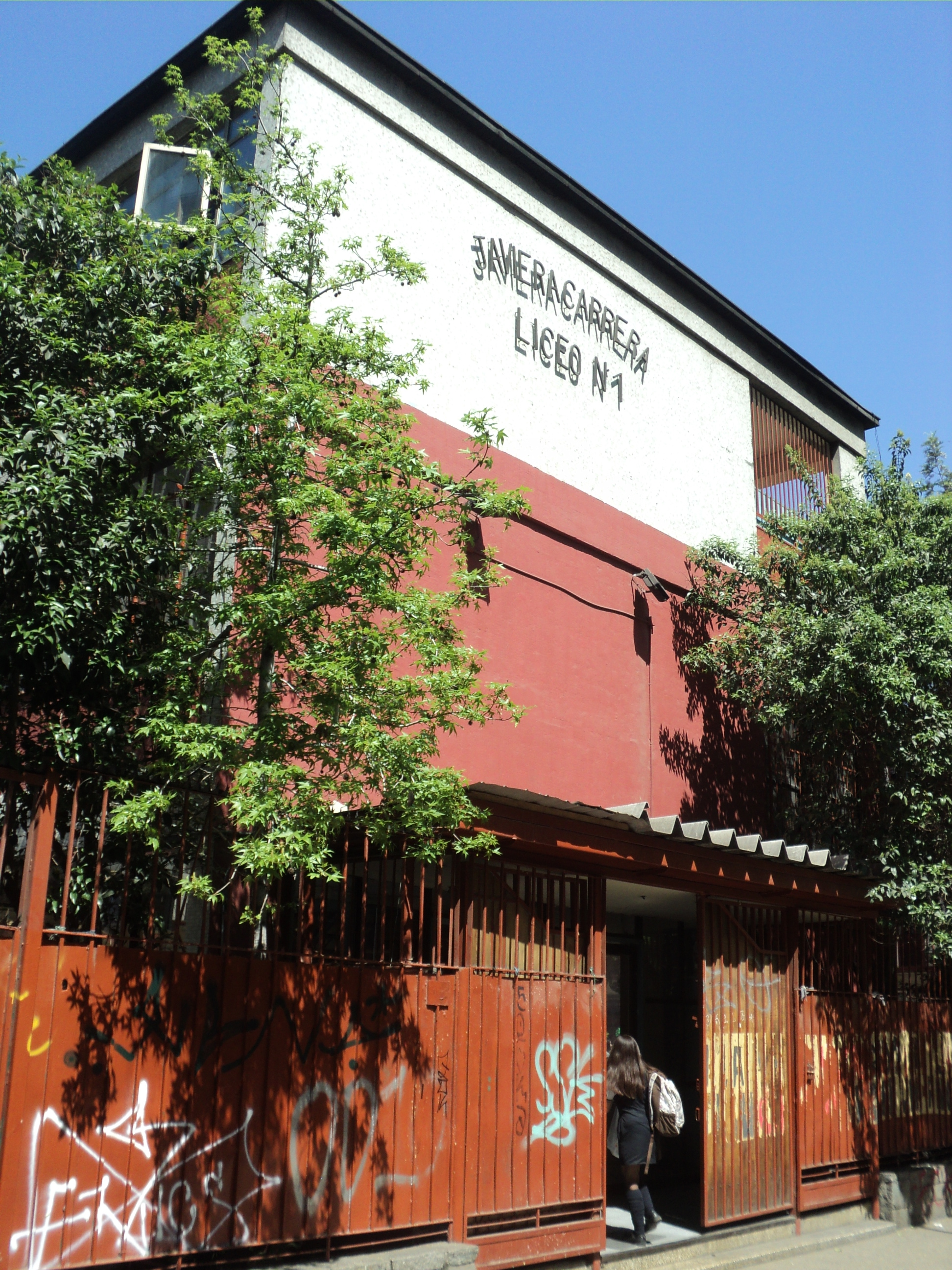 Entrada al Liceo N° 1 "Javiera Carrera" de Santiago